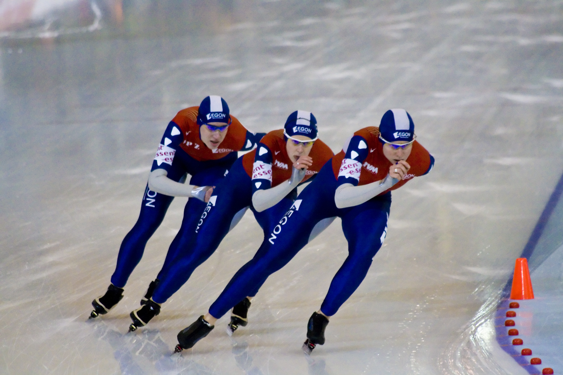 Team Netherlands, Ladies' Team Pursuit. Ireen Wüst, Renate Groenewold, Jorien Voorhuis